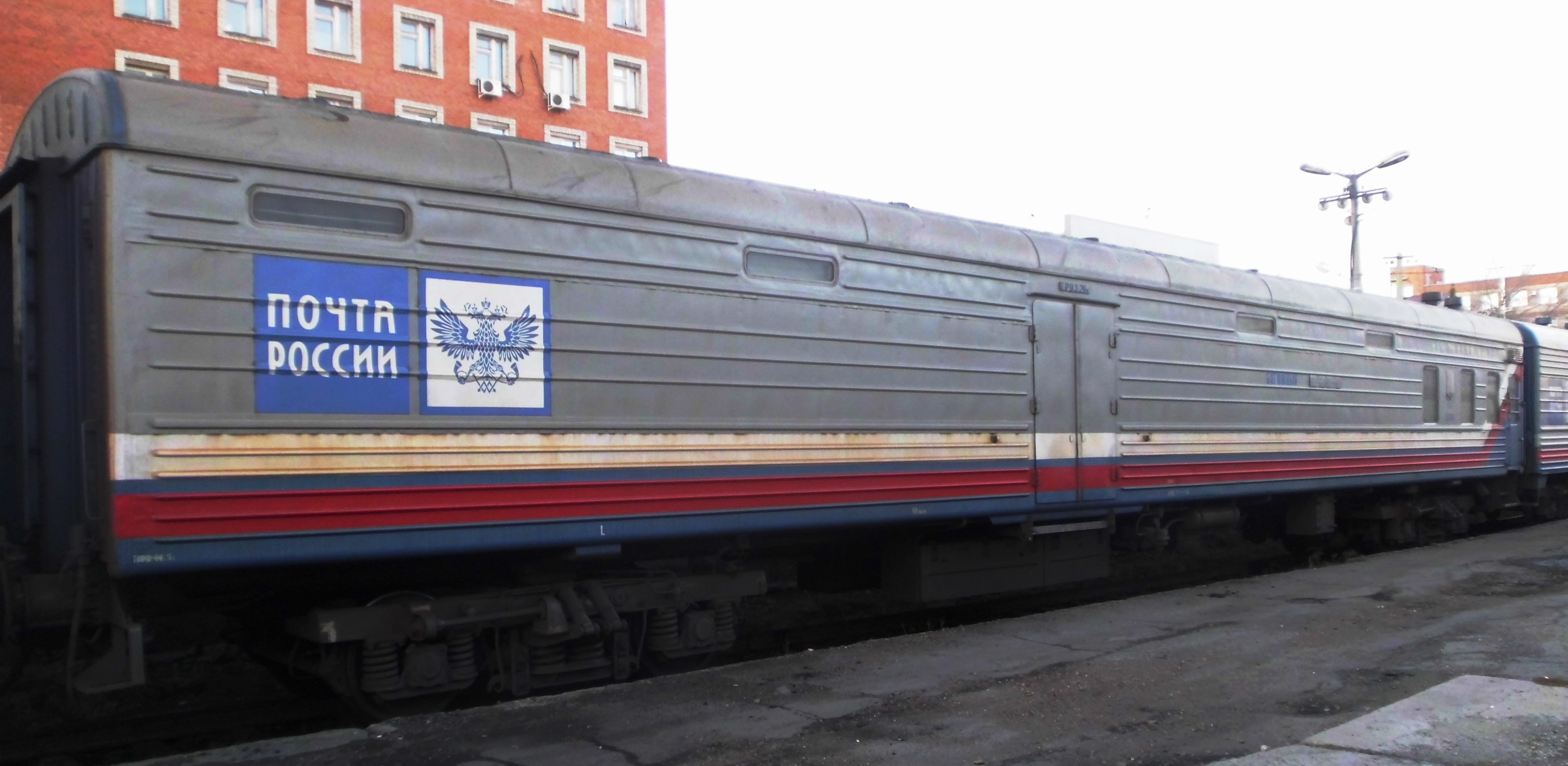 Багажный вагон ФГУП "Почта России" на базе четырехосного цельнометаллического багажного вагона модели 61-517. Россия, станция Челябинск-Главный, подъездные пути Челябинского Почтамта.